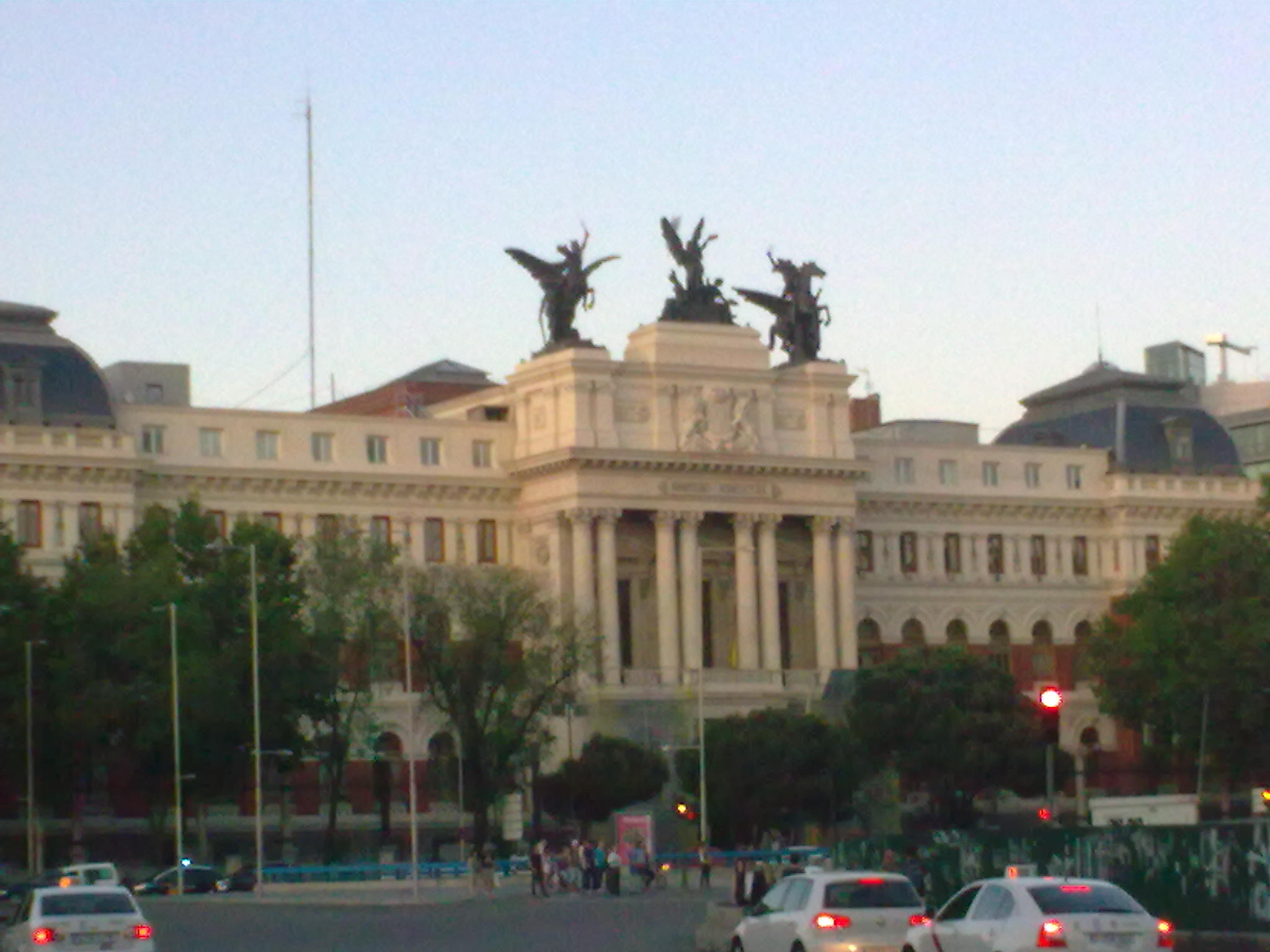 Ministerio desde la calle de Delicias.